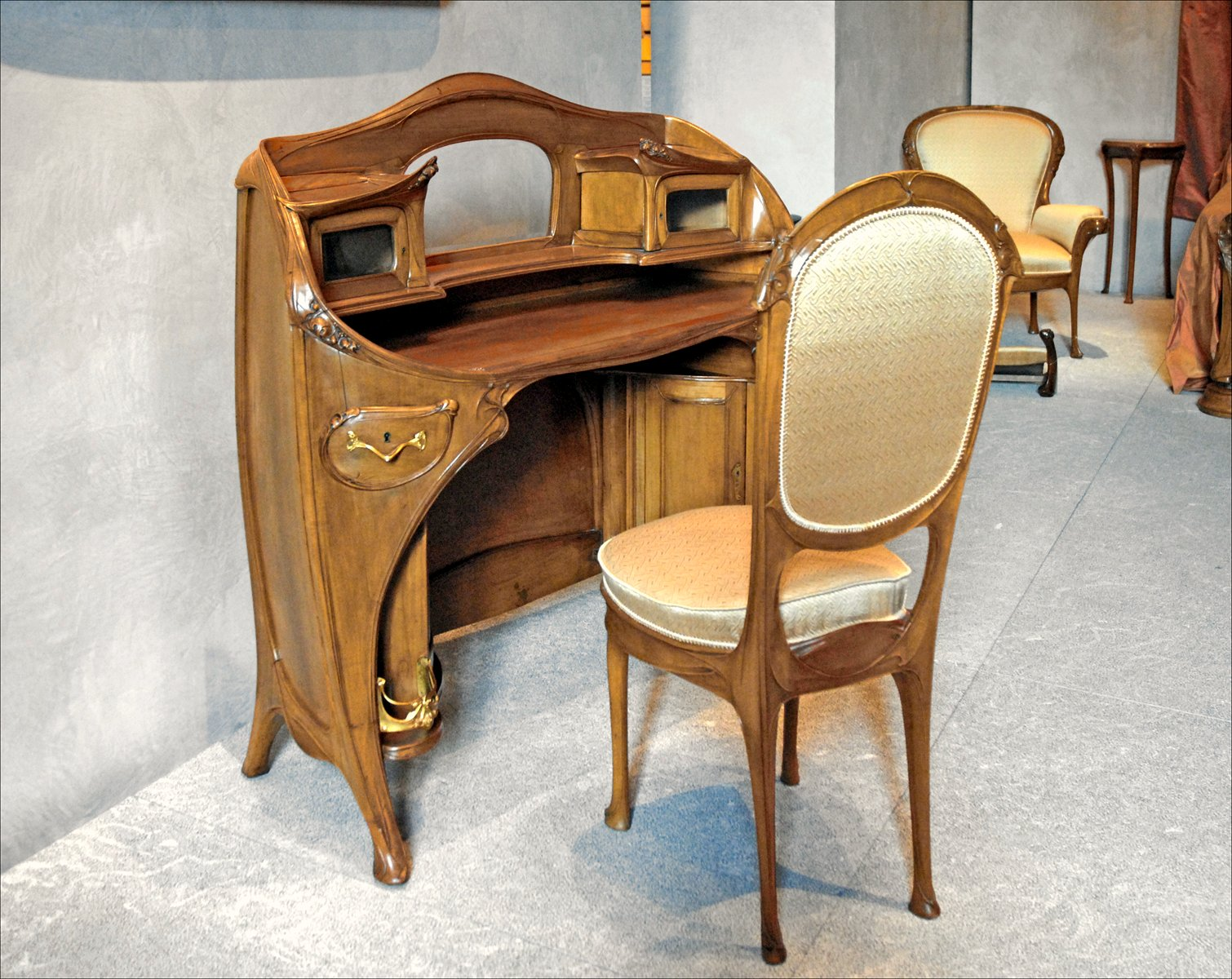 Mobilier provenant de la Chambre à coucher de l'Hôtel Guimard (122 avenue Mozart à Paris) 1909-1912 Tous les meubles sont des créations d'Hector Guimard (Lyon 1867 - New-York 1942) Poirier, érable moucheté chef-d'oeuvre du musée Site du musée Don d'Adeline Oppenheim-Guimard (1872-1962)